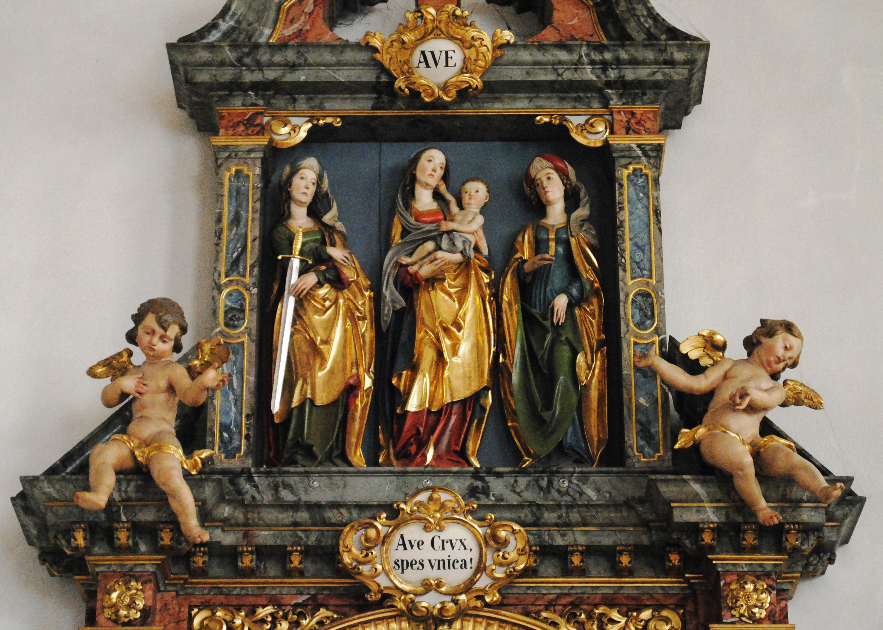 Auszug, Kreuzaltar, Riemenschneiderschule, Jakobskirche, Großlangheim